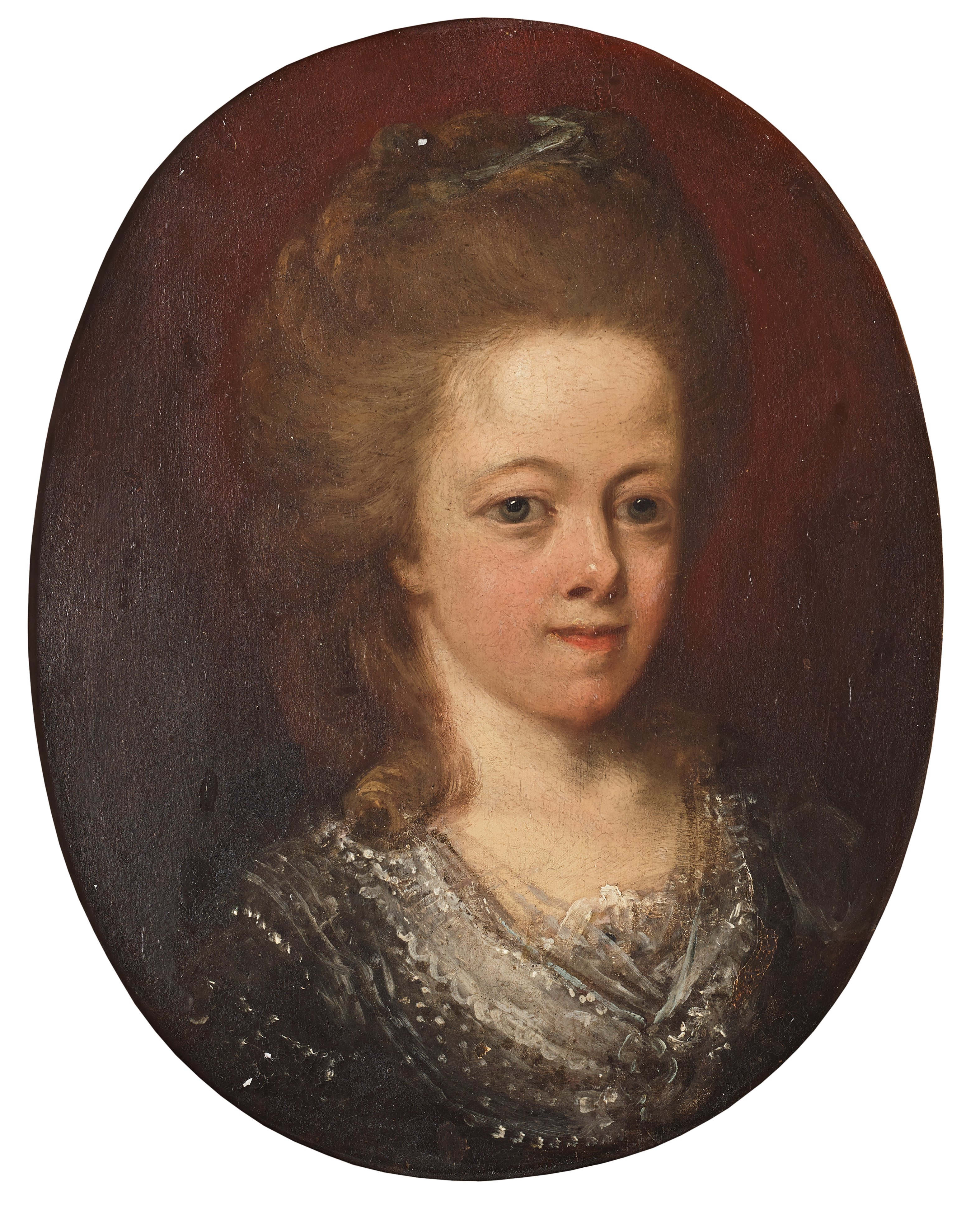 Porträtt av Katarina Eleonora Benzelstierna (1751-1822), troligen avporträtterad under 1770-talet av Elias Martin.